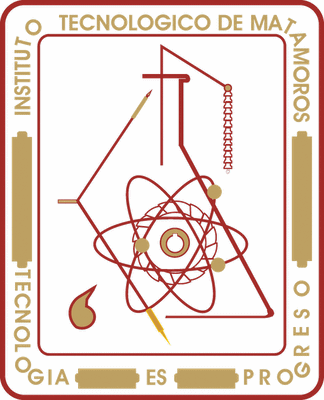 LOGO ITM